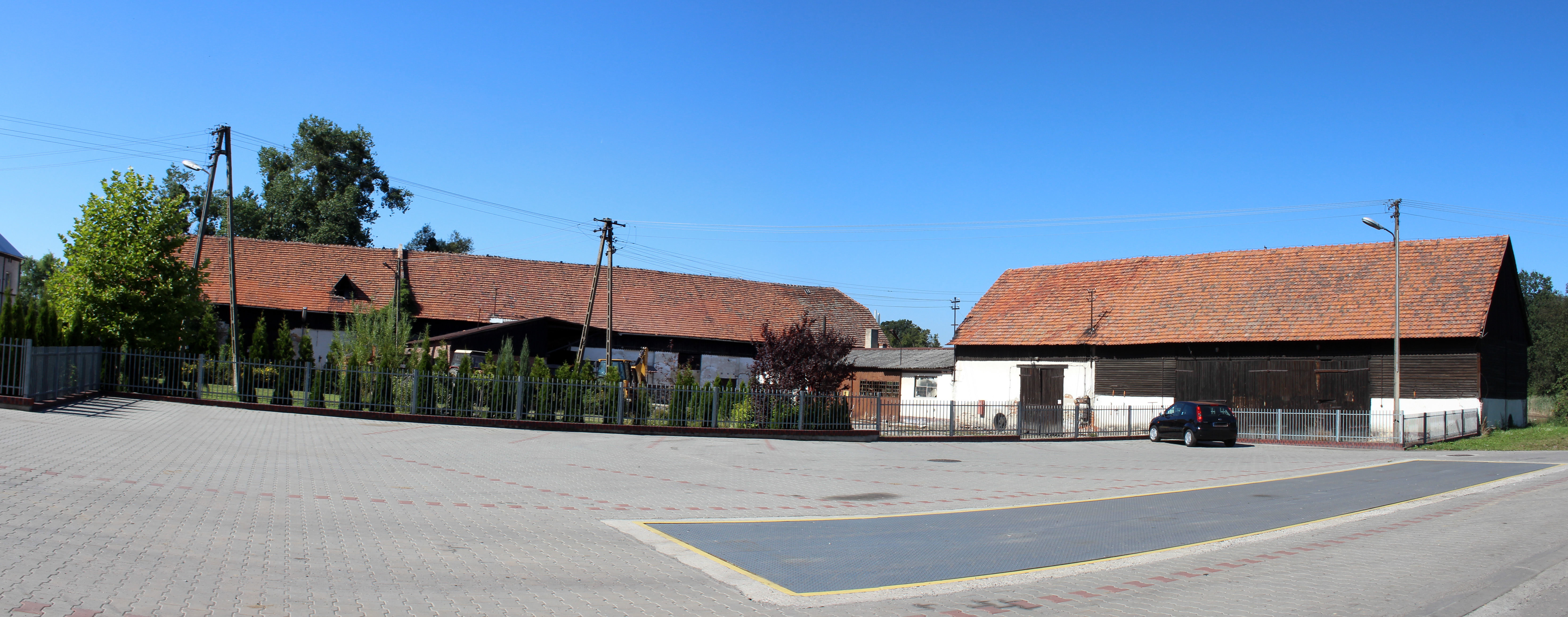 Wydrowice - wieś w Polsce w województwie opolskim, w powiecie opolskim w gminie Niemodlin.